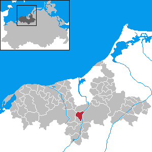 Pölchow in Mecklenburg-Western Pomerania - District Bad Doberan